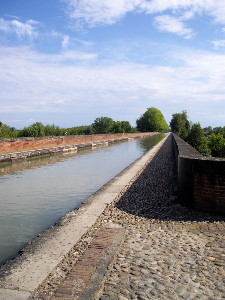 Pont-canal du Cacor permettant au canal de Garonne de franchir le Tarn (Moissac, Tarn-et-Garonne, France)